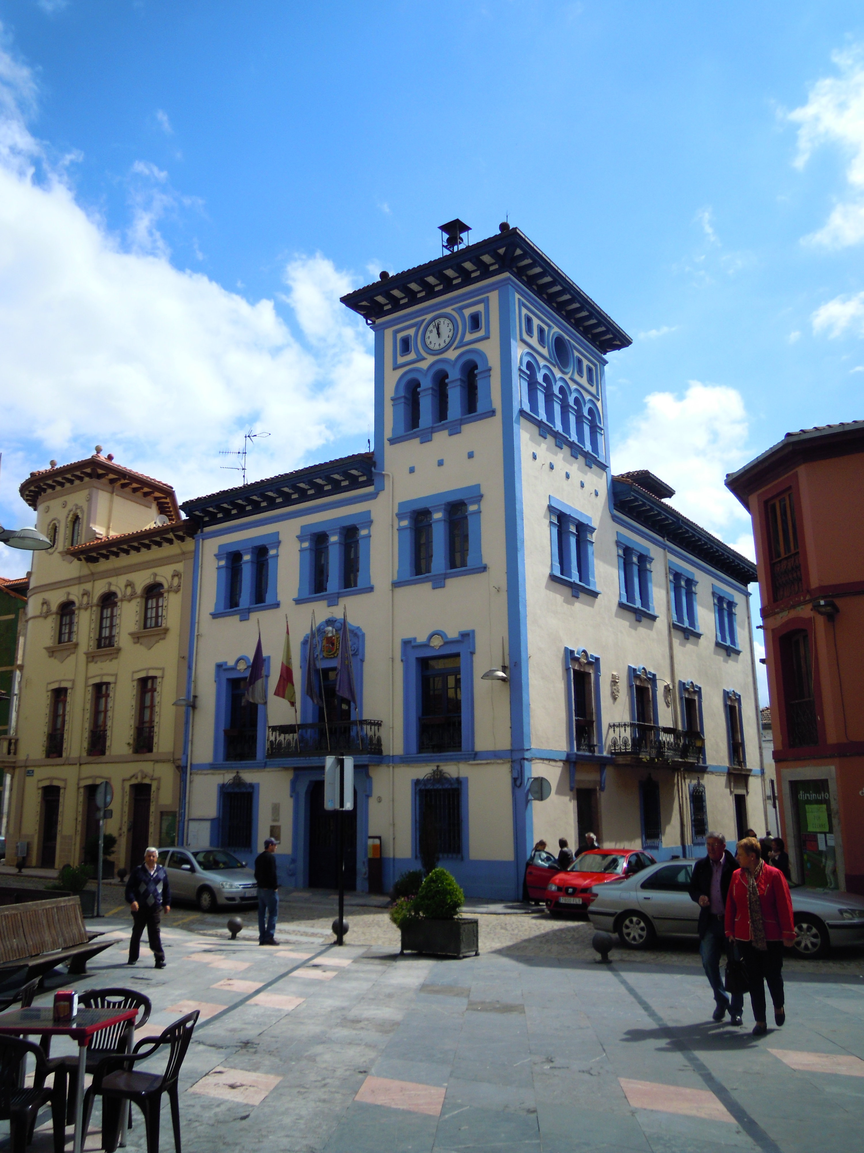 Casa'l conceyu de Grau